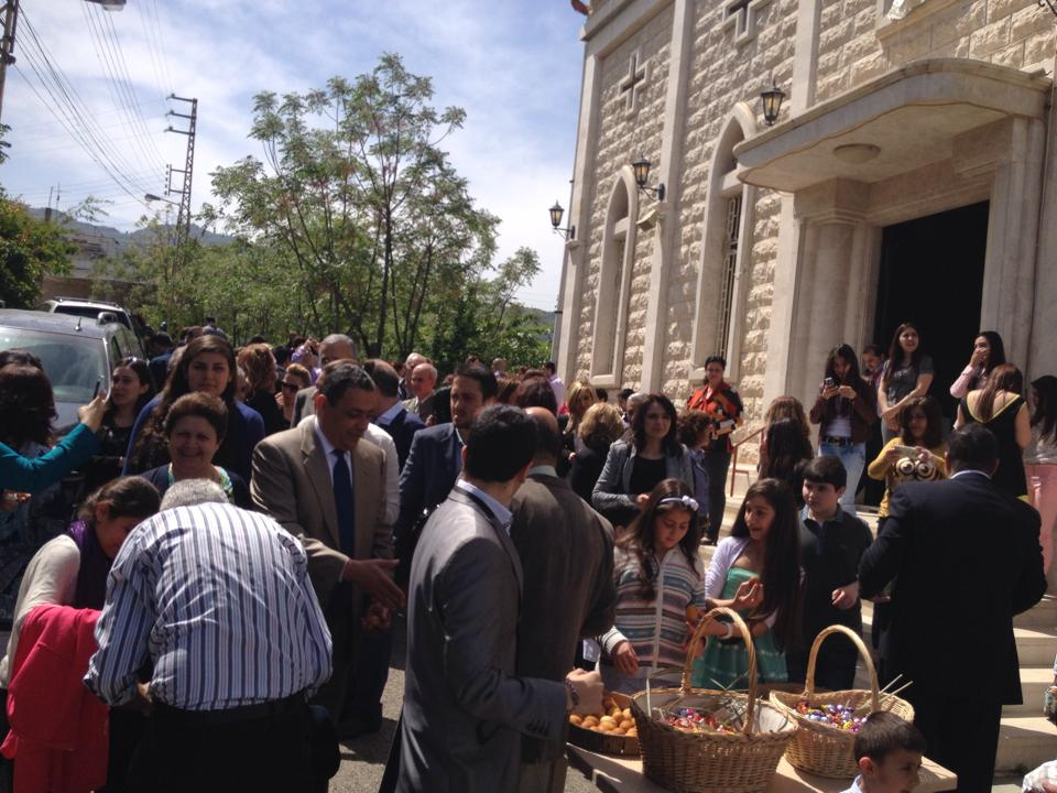 Après la messe de paques